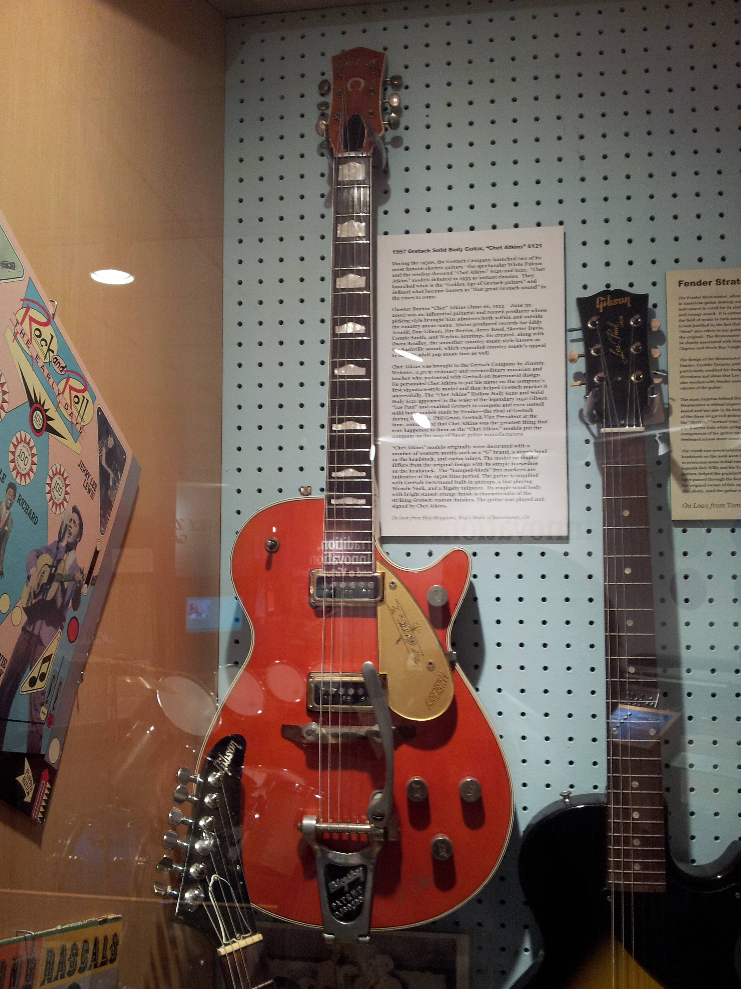 Gretsch "Chet Atkins" 6121 (1957), Museum of Making Music